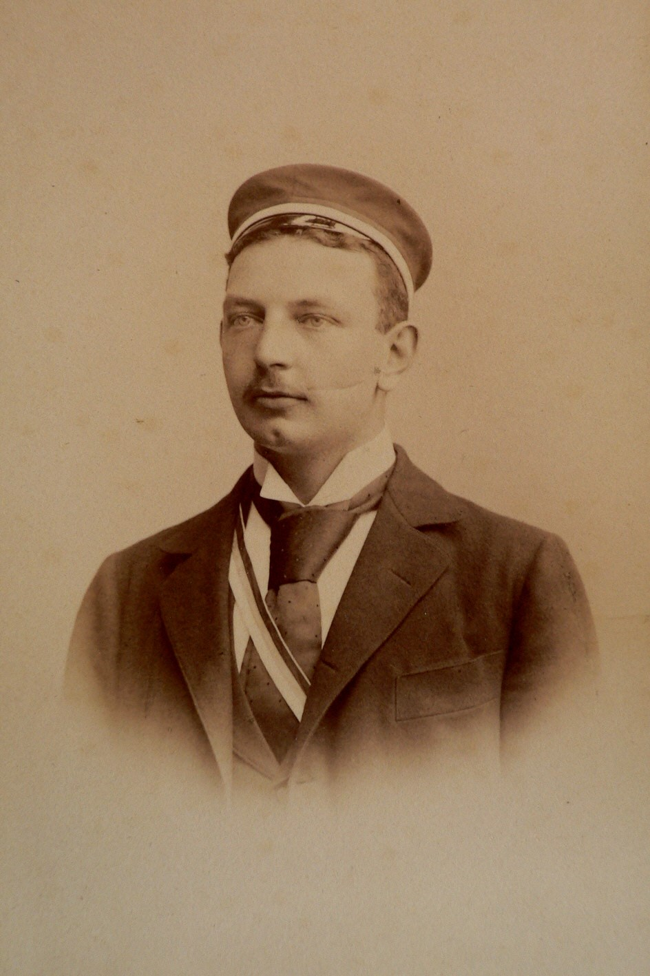 Porträtfotografie des späteren Gynäkologen Erich Opitz